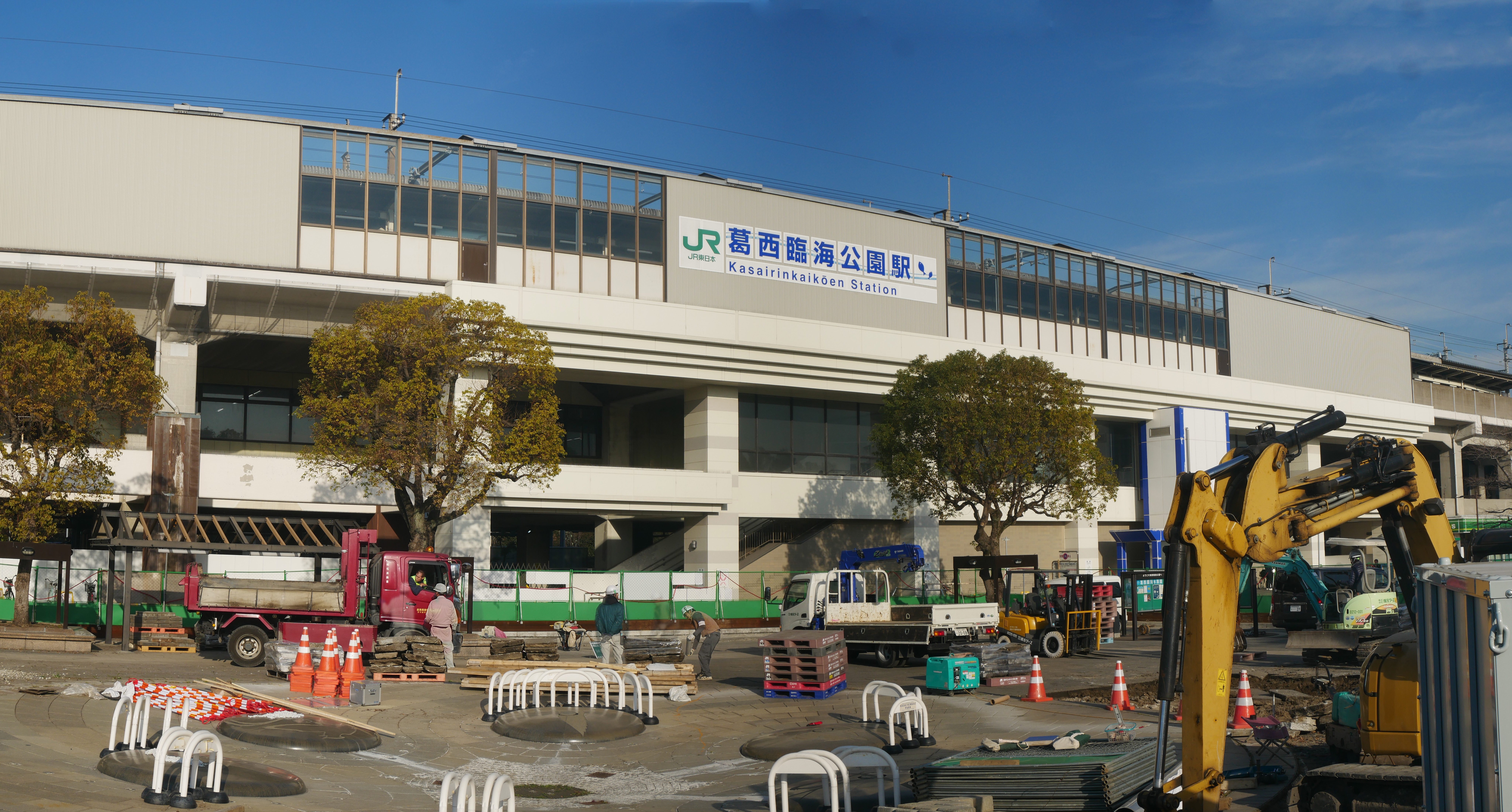 Kasai-Rinkai Park Station (葛西臨海公園駅)